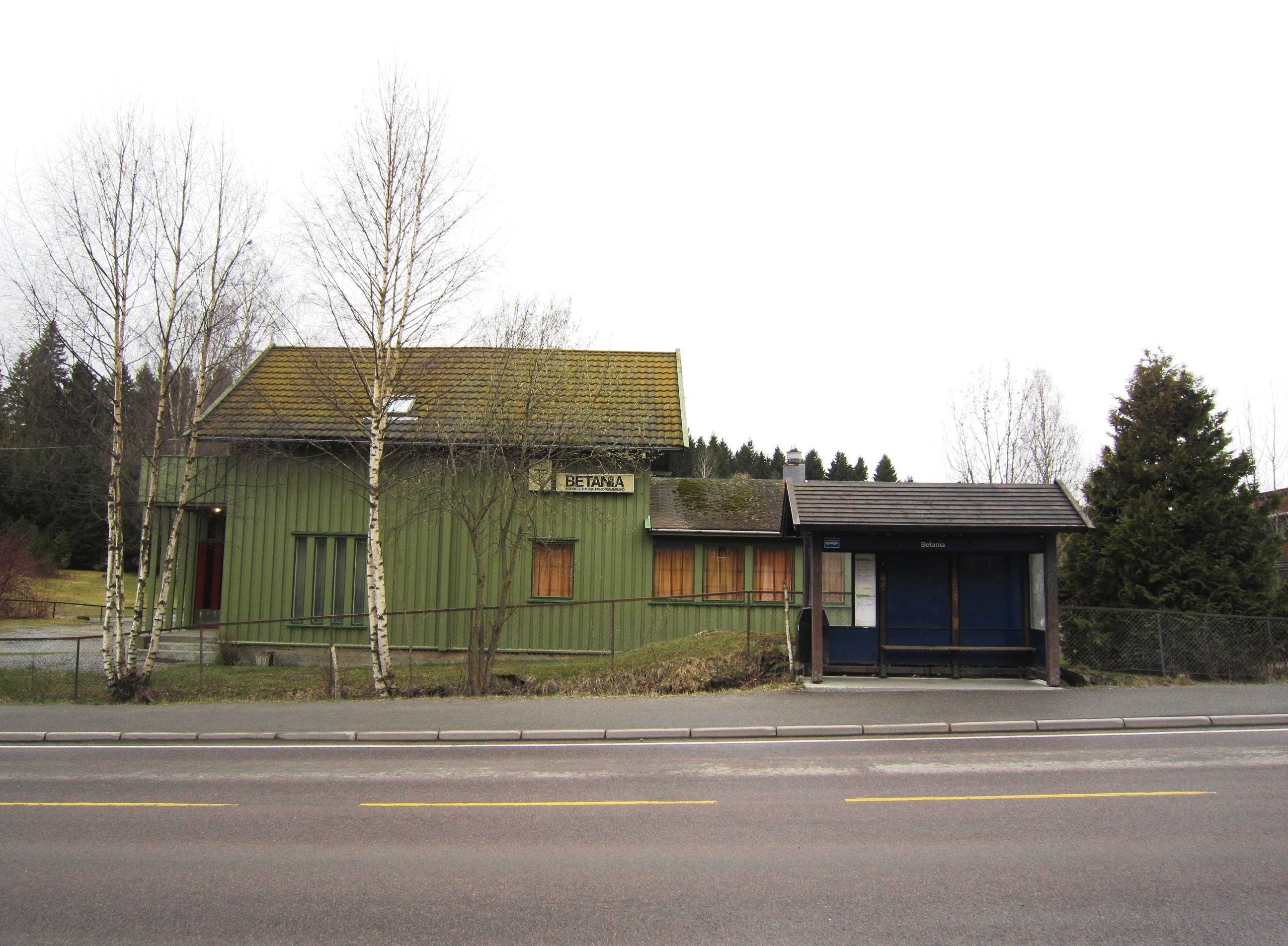 Betania Lørenskog med fylkesvei 353 foran